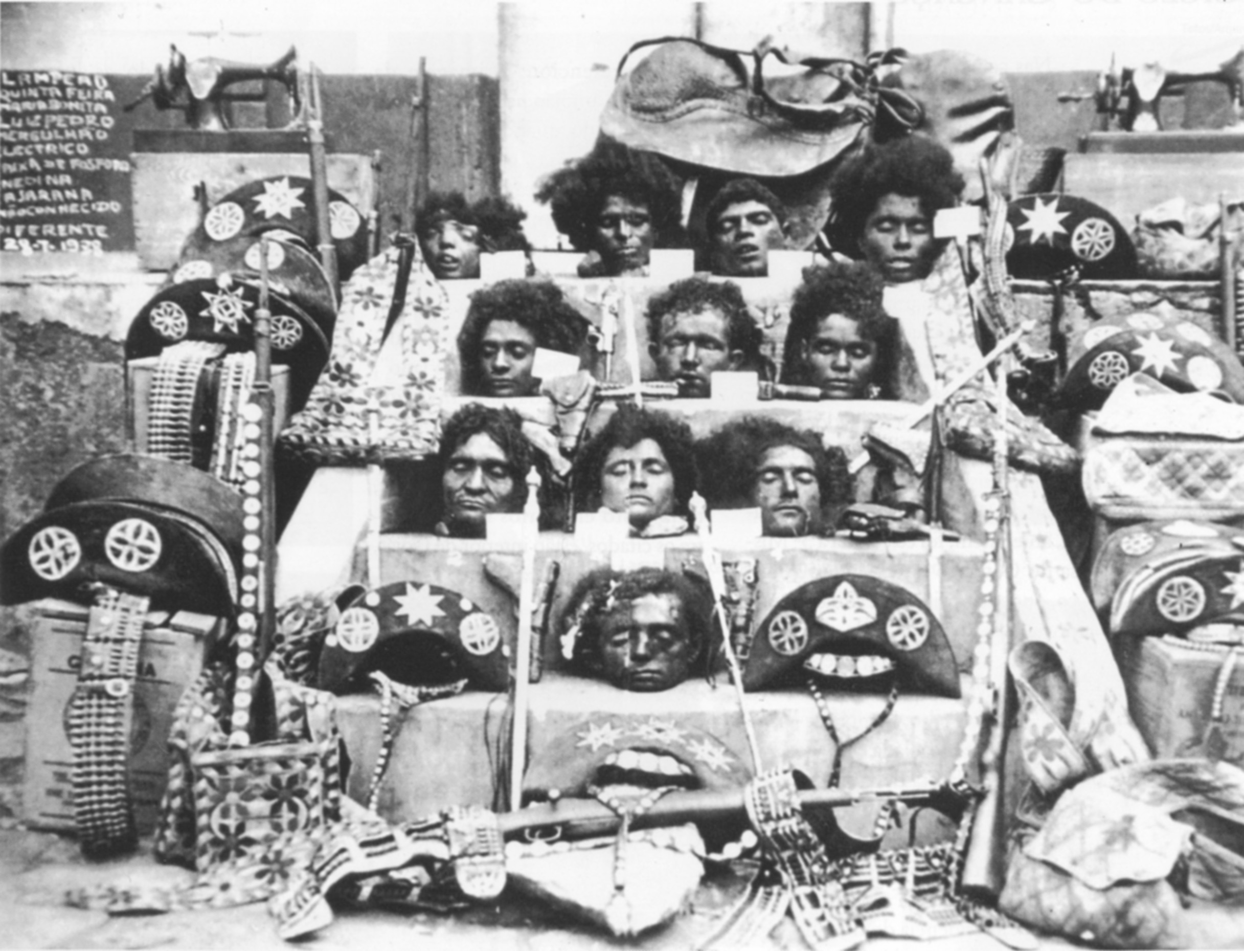 Retratos do cangaço: Imagem oficial da degola do bando de Lampião